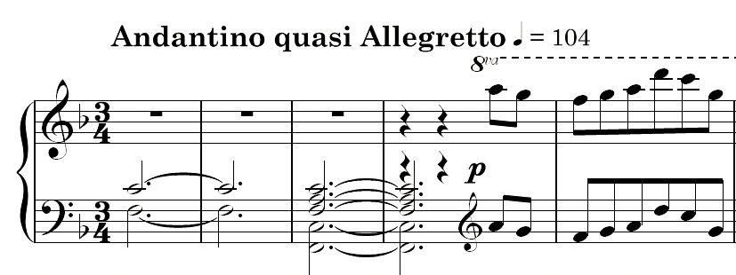 Introdukcja do 'Ronda à la Krakowiak F-dur op. 14 Fryderyka Chopina.